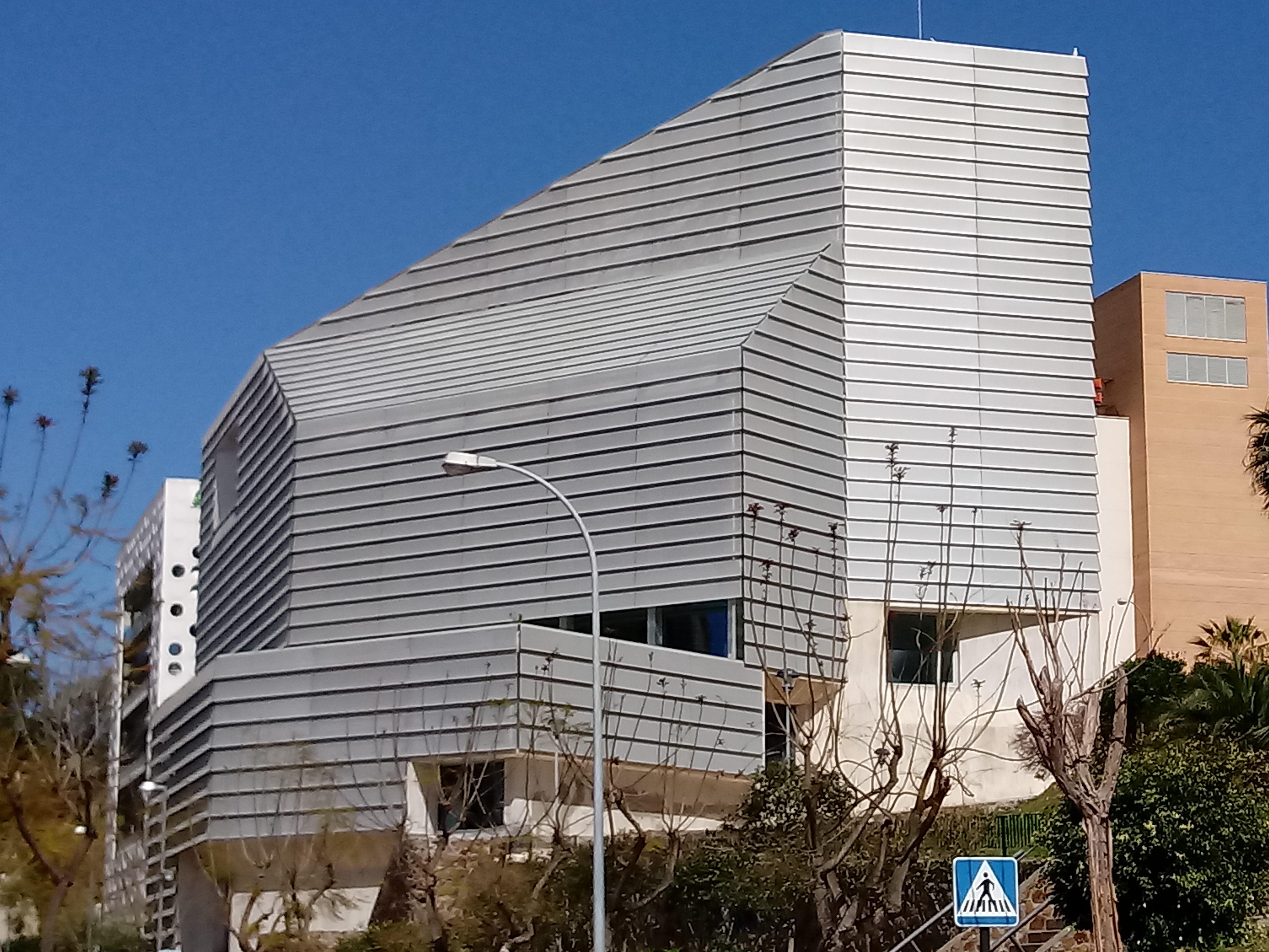 Blioteca del Estado. En la calle Alcalde Manuel Olivencia s/n.